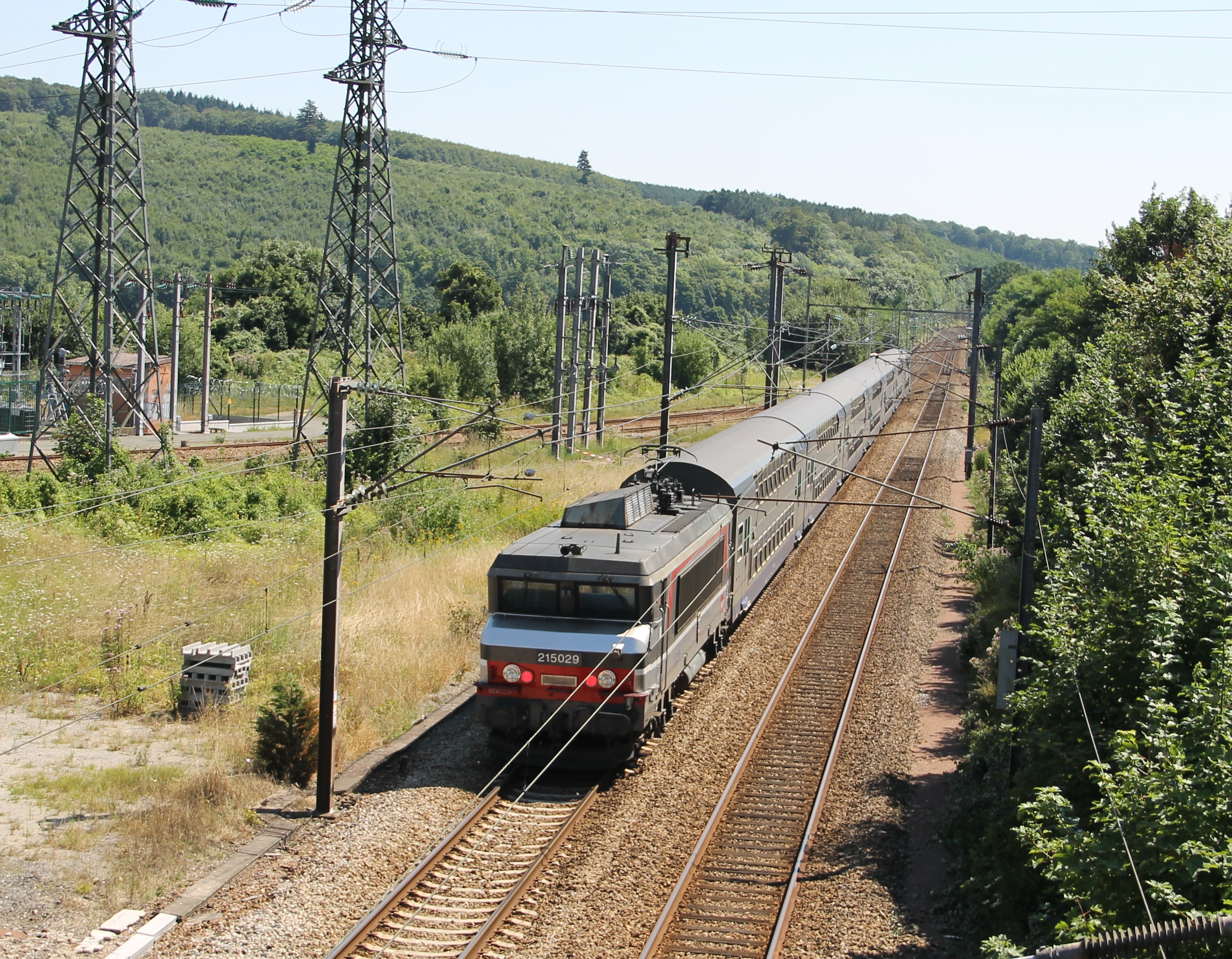 Rame V2N poussée par une locomotive BB 15000 à la bifurcation de Malaunay, Seine-Maritime, France.